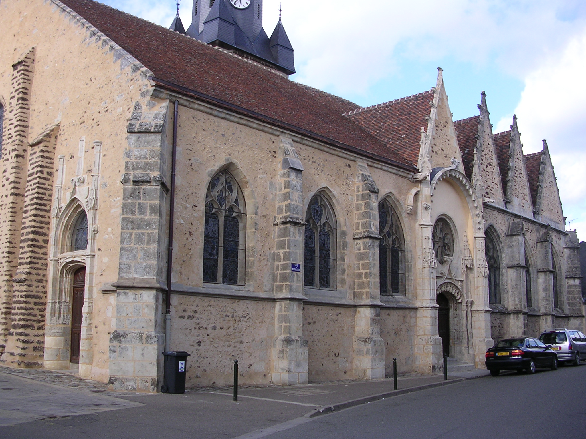 Église Saint-Jean-Baptiste de la Bazoche-Gouët, Eure-et-Loir (France).